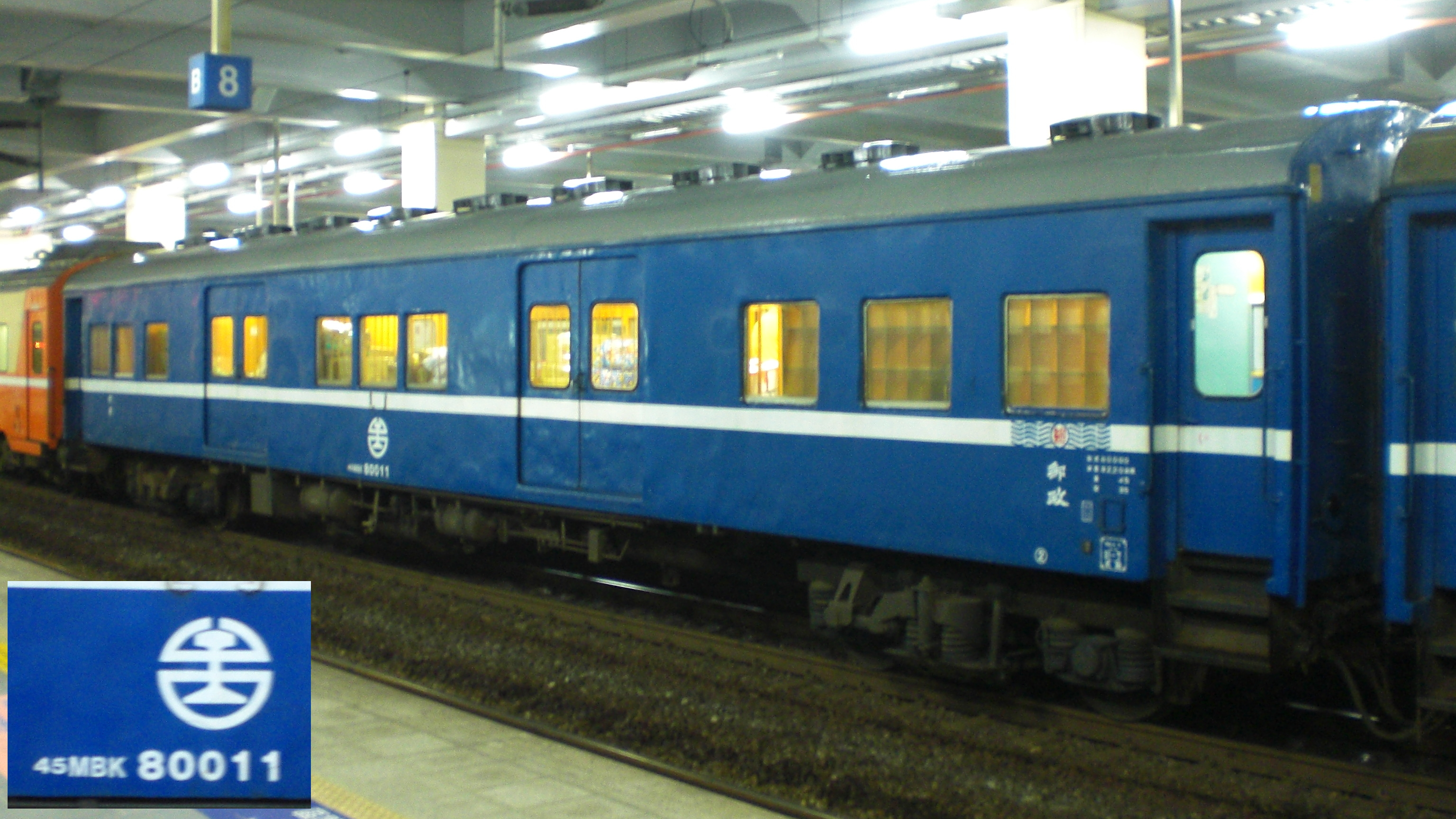 2012年12月19日，臺灣鐵路管理局郵政行李車MBK80011停靠七堵車站第二月臺。